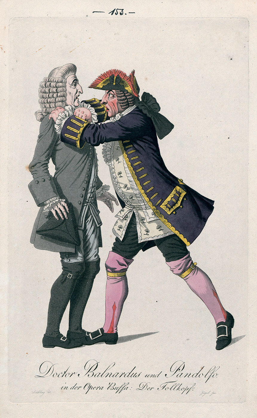 Doctor Balnardus und Pandolfo aus der Opera buffa "Der Tollkopf" (Mehul: L' irato ou L'emporté), Berlin 1804; aus: A. W. Iffland (Hrsg.). "Kostüme auf dem Kön: National-Theater in Berlin". Berlin, Wittich 1805-1812